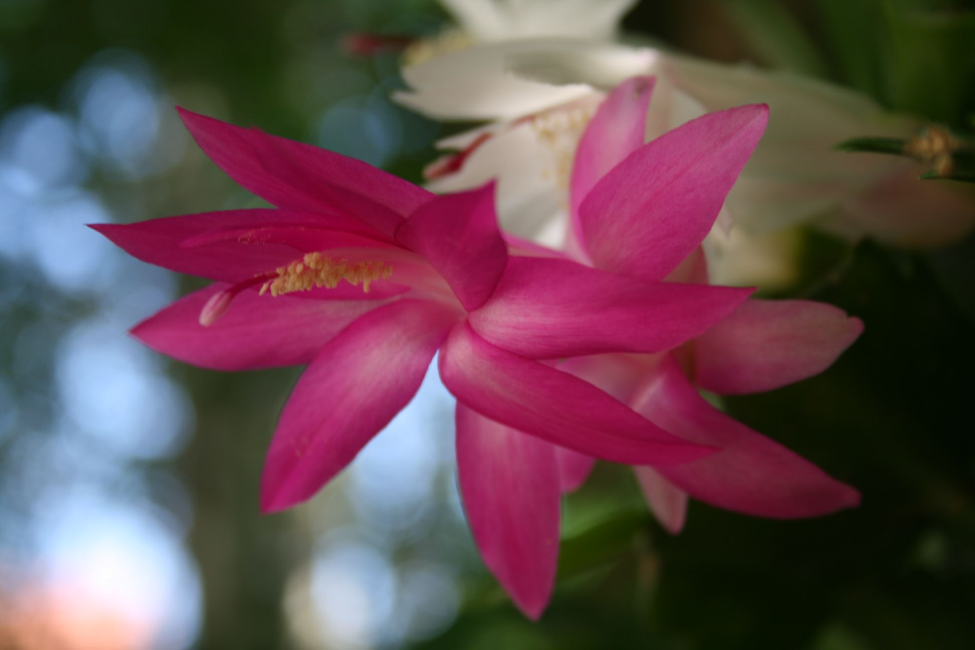 Schlumbergera X reginae (Rhipsalideae; Cactaceae; Planta) kaktusz 'Jolly Dancer' változatának virága